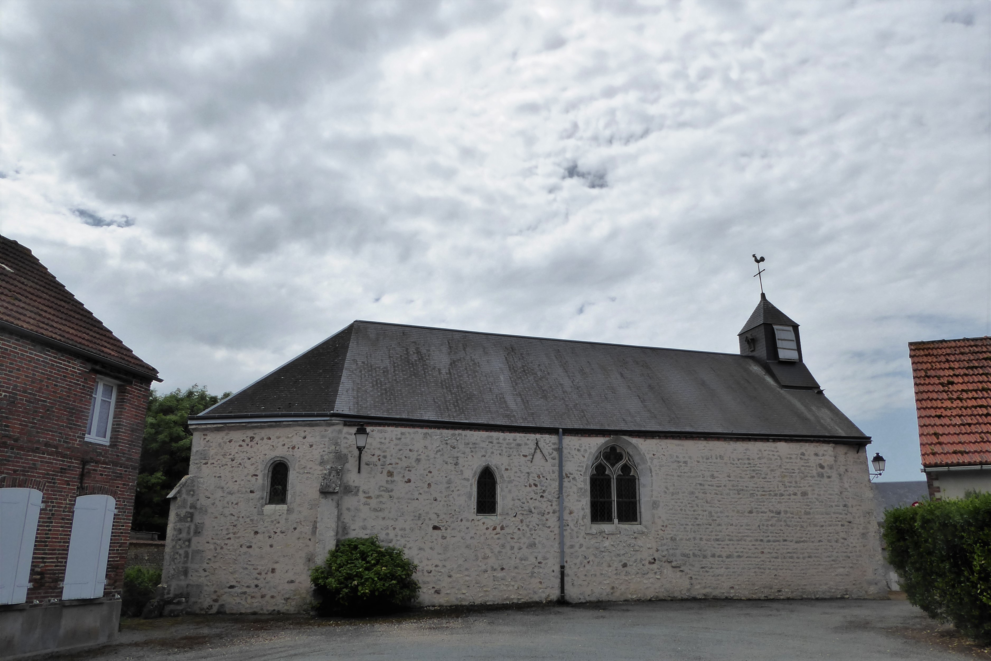 Église Saint-Taurin de Pézy, Theuville, Eure-et-Loir, France.